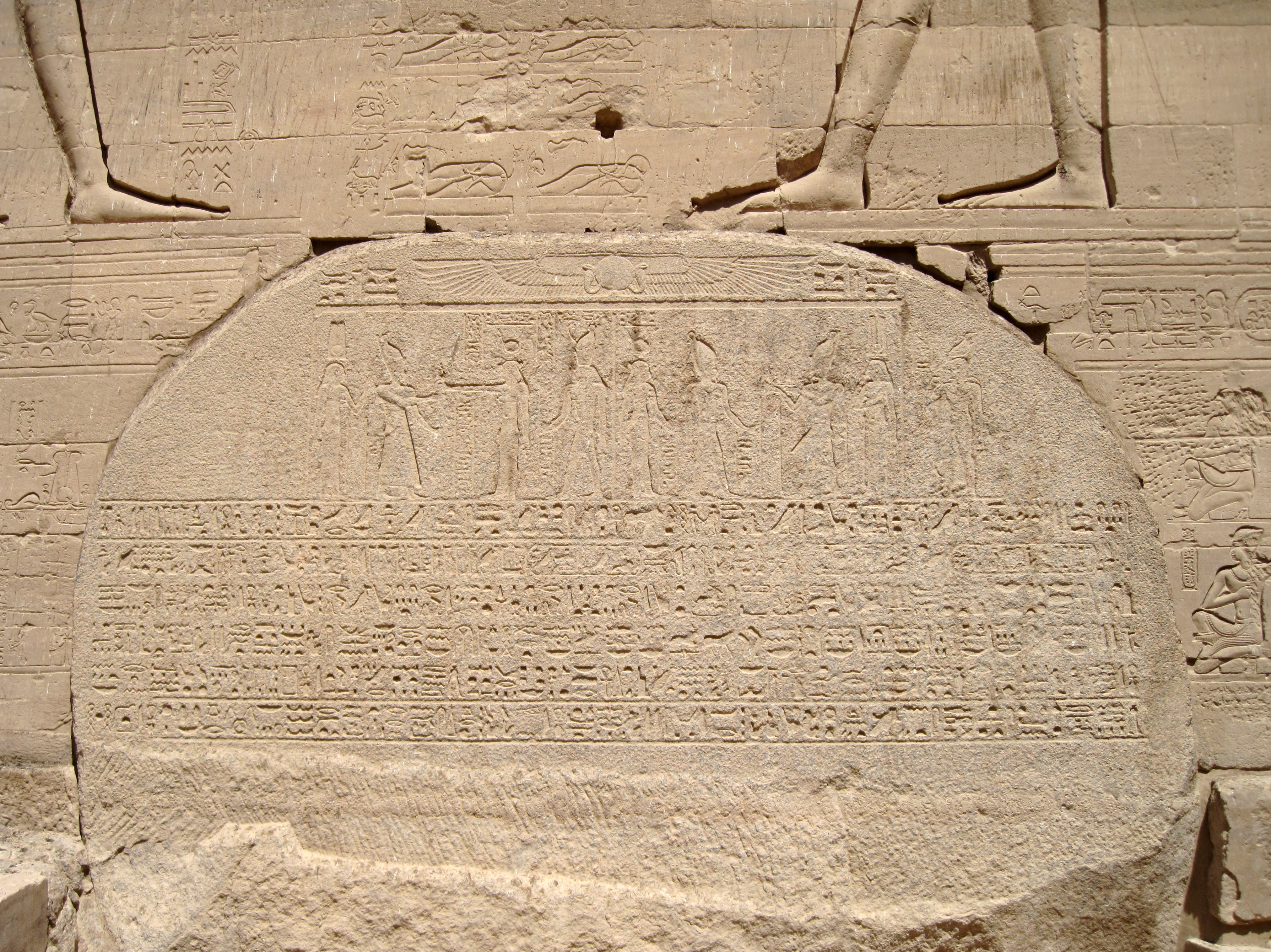 Granitstele des Ptolemaios VI. vor dem zweiten Pylon des Isis-Tempels von Philae auf der Insel Agilkia, Ägypten